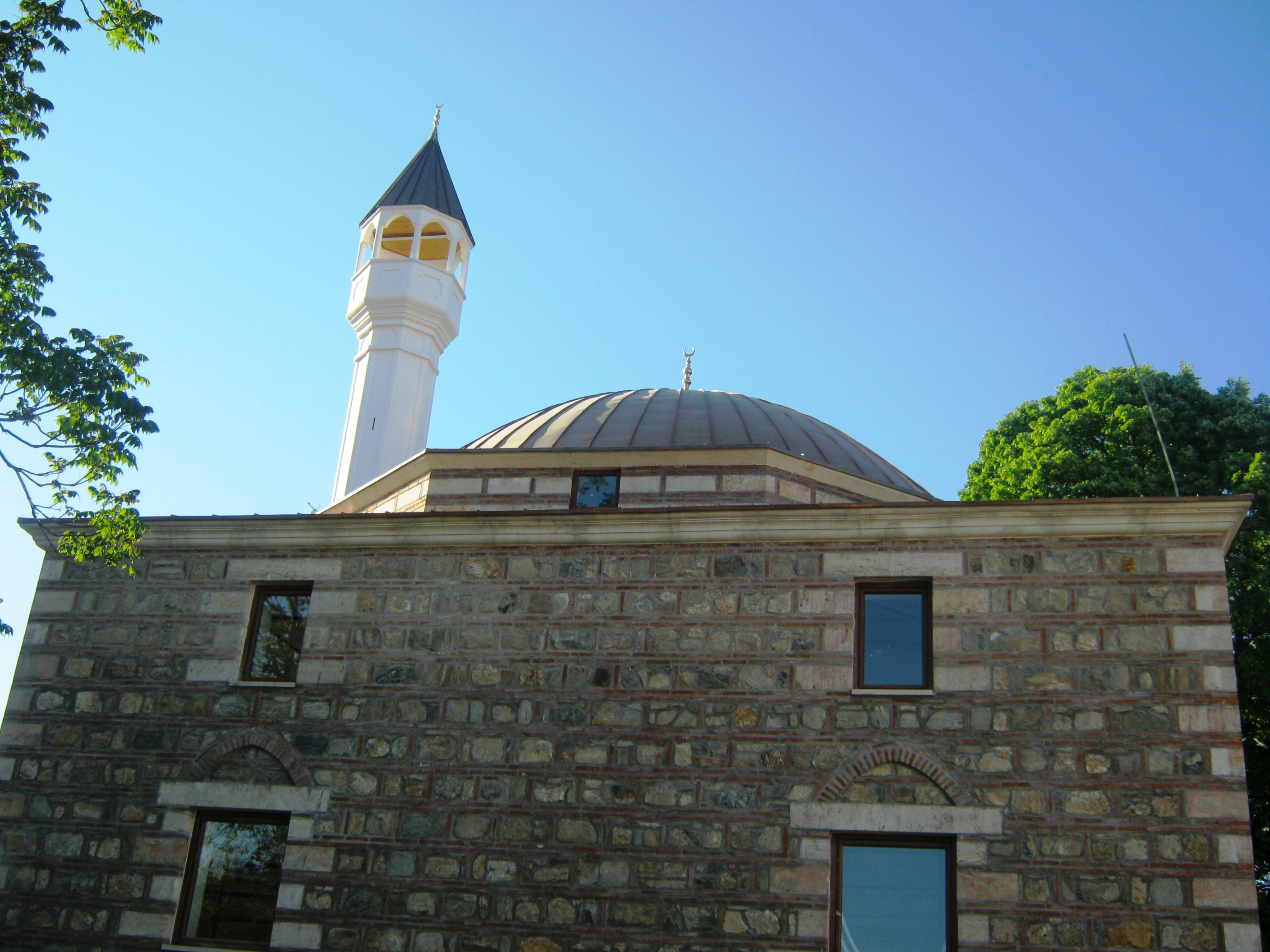 Џамија Араста во Скопје